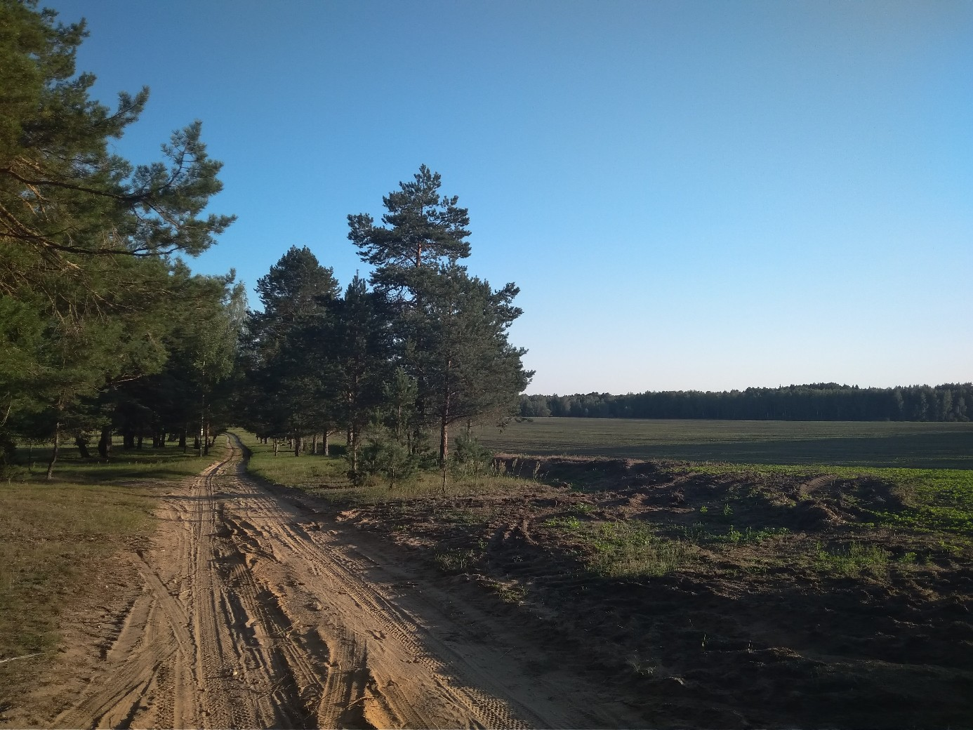 Пейзажи вокруг сожжённой деревни Литавец